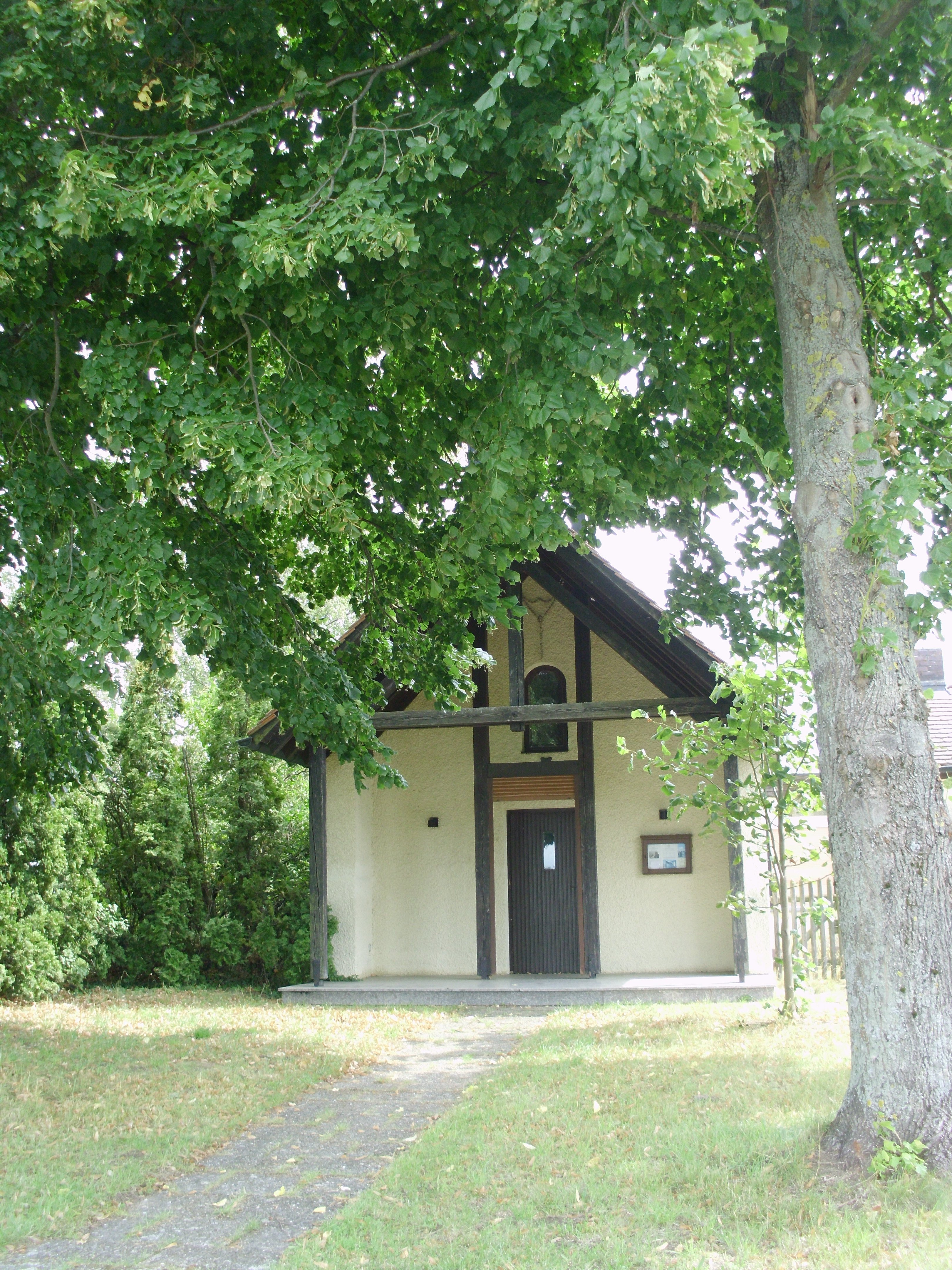 Ortskapelle von Kauerlach, Ortsteil von Hilpoltstein im mittelfränkischen Landkreis Roth